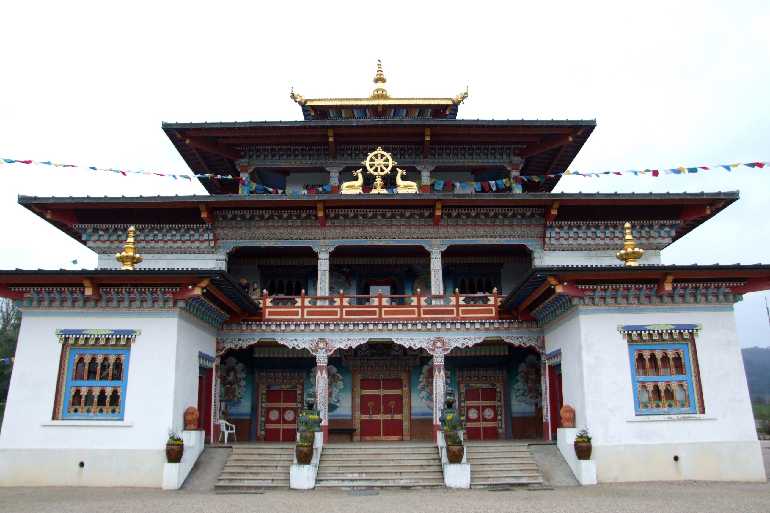 Temple des mille Bouddhas, Saône-et-Loire, Bourgogne, FRANCE